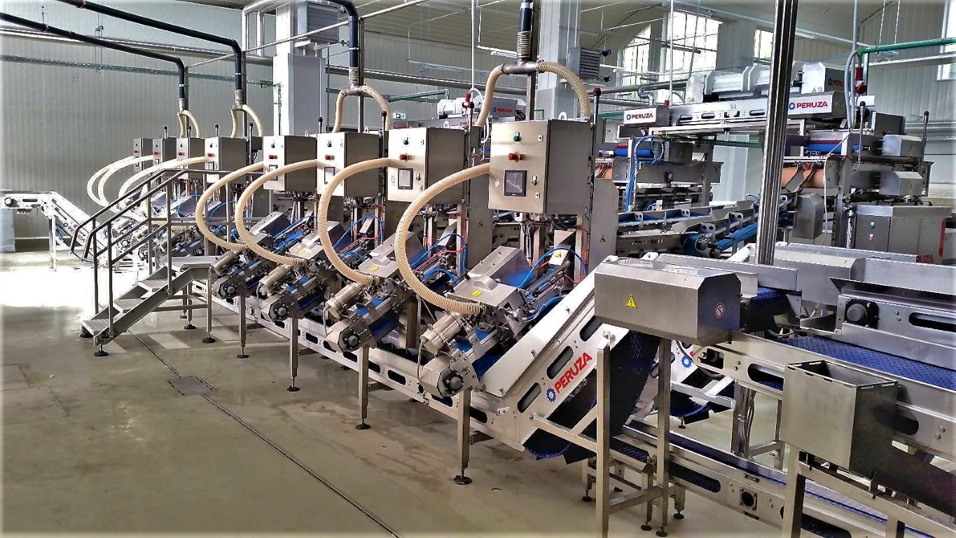 Peruza - оборудования для рыбоперерабатывающих цехов